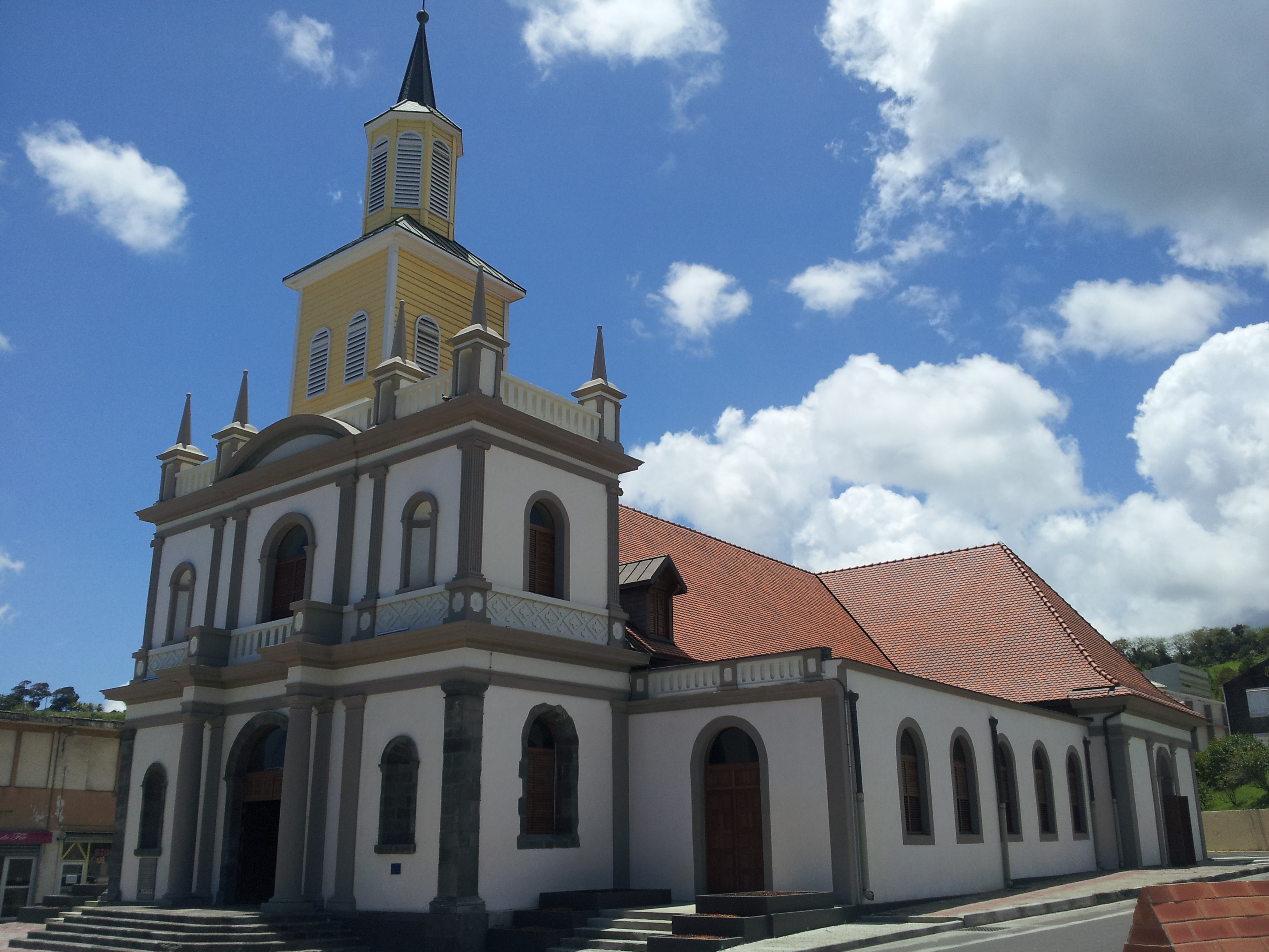 Église Saint-Hyacinthe du Lorrain